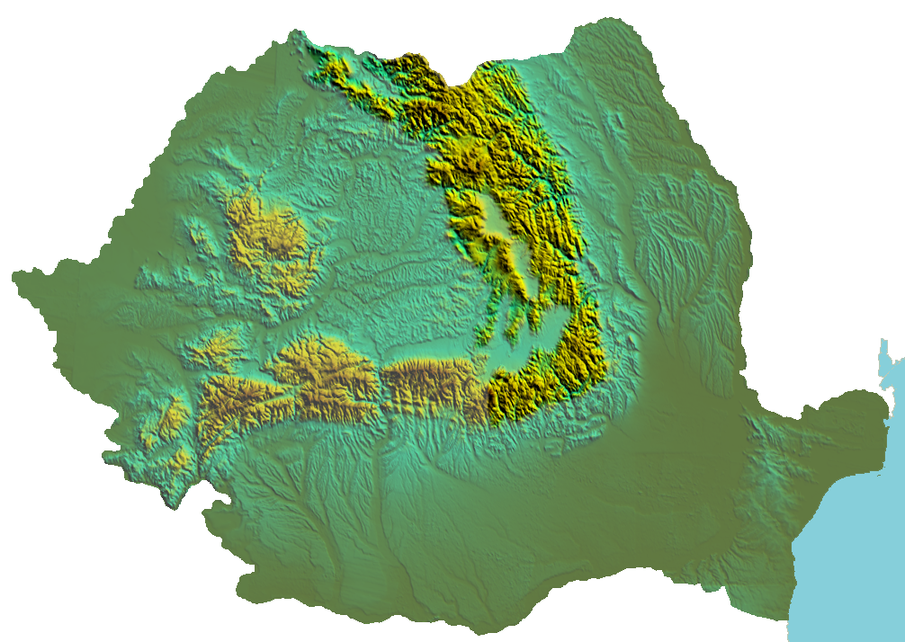 Carpatii Orientali in Romania Image:hartalow[1].jpg